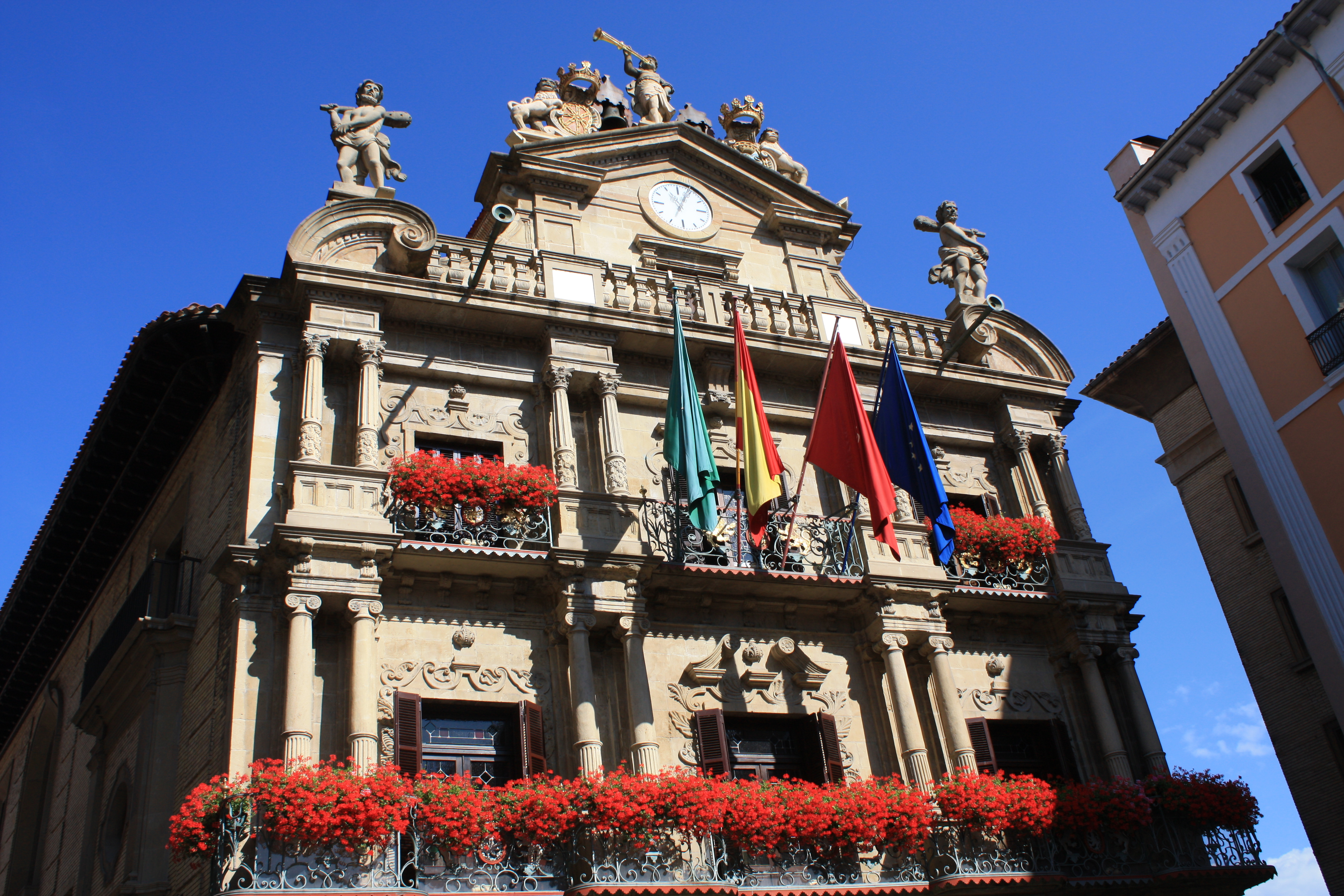 Ayuntamiento de Pamplona, Pamplona (ES)